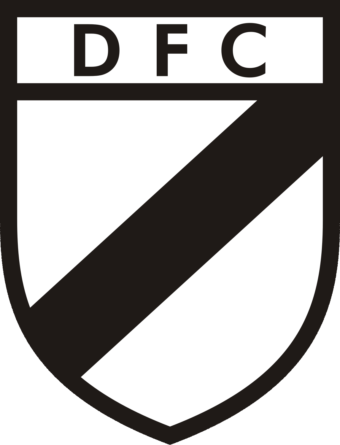 Escudo oficial de Danubio Fútbol Club (2016)